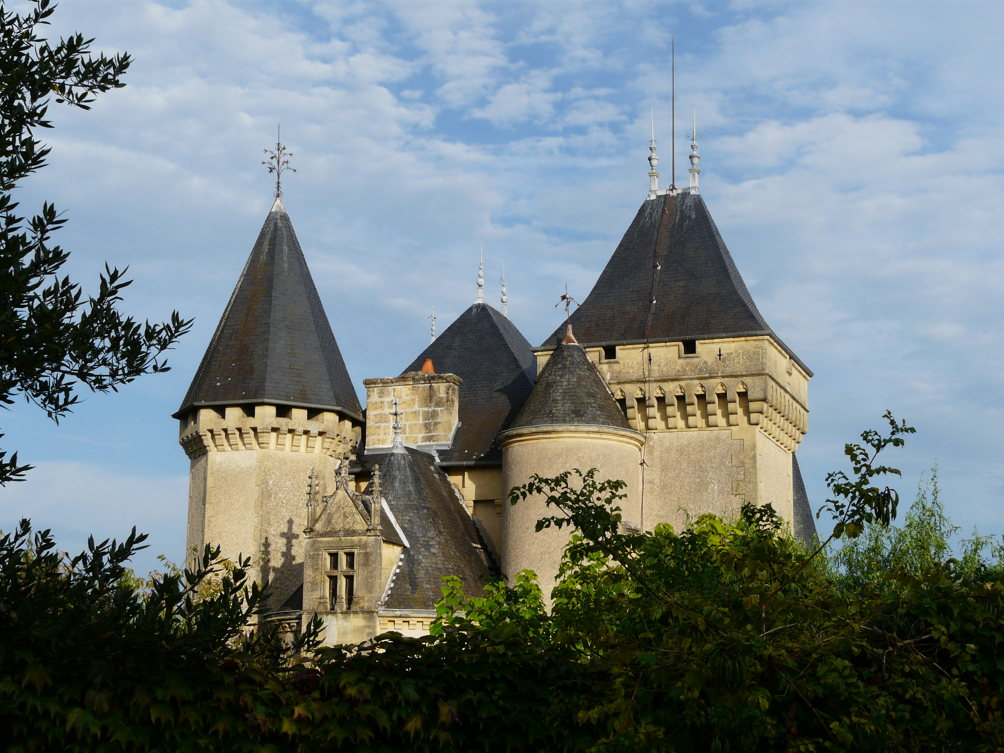 Les toits du château de Sauvebœuf, Lalinde, Dordogne, France.